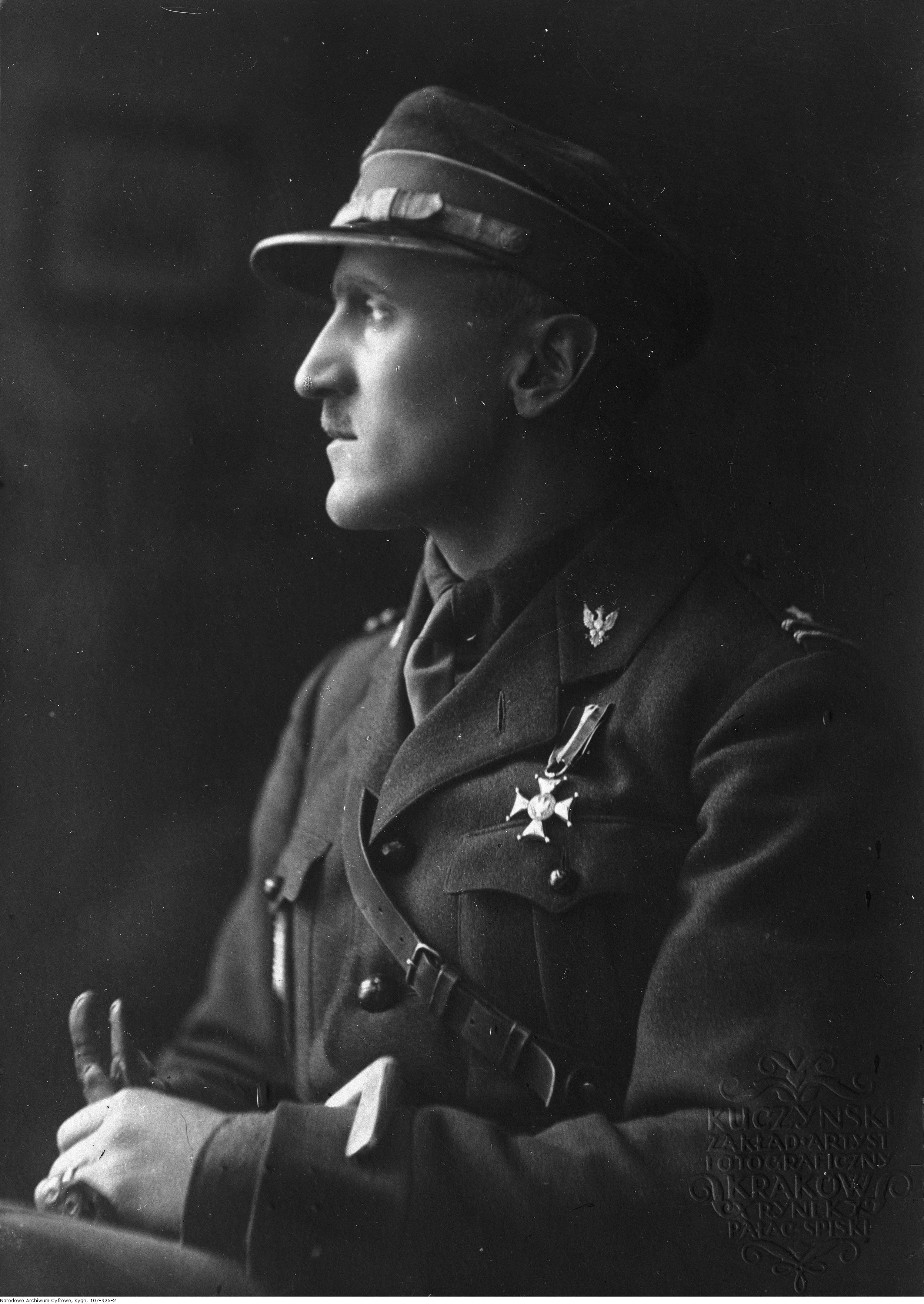 Portet (popiersie) - profil, lewa strona.